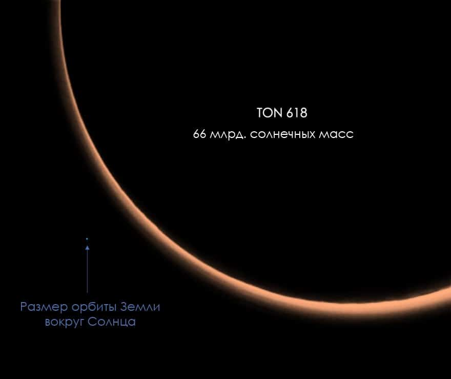 Порівняльний розмір TON 618 і орбіти Землі